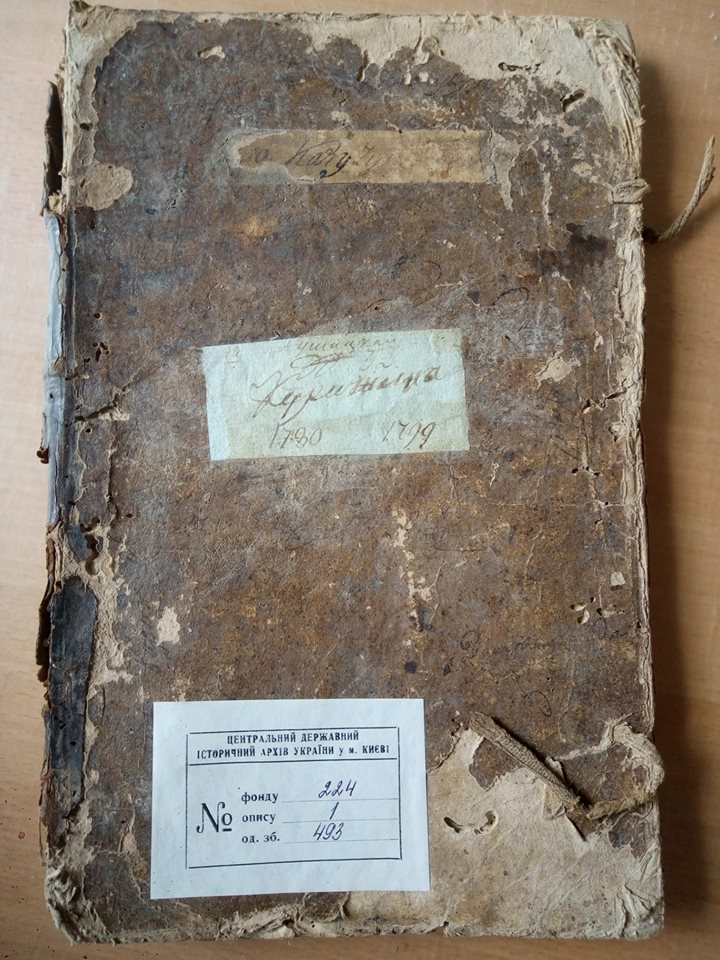 Метрична книга